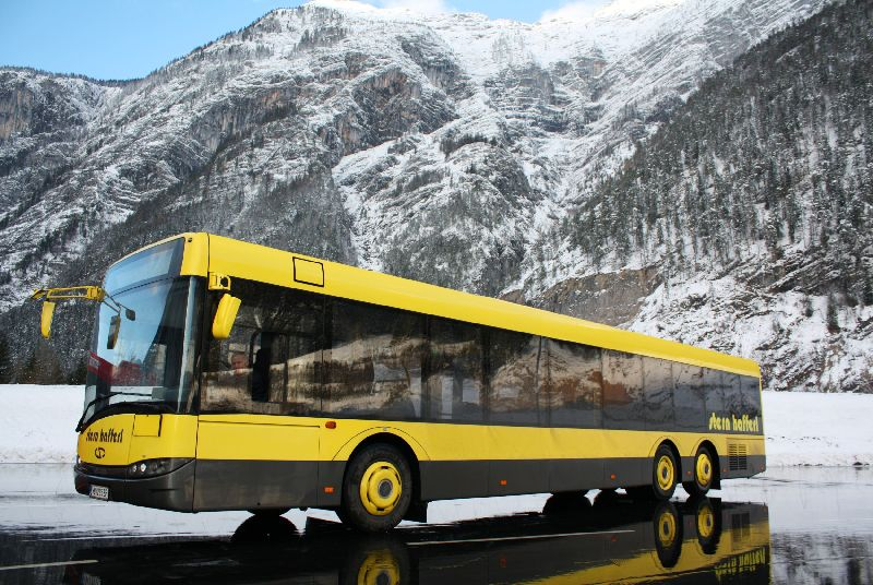 Urbino 15 LE